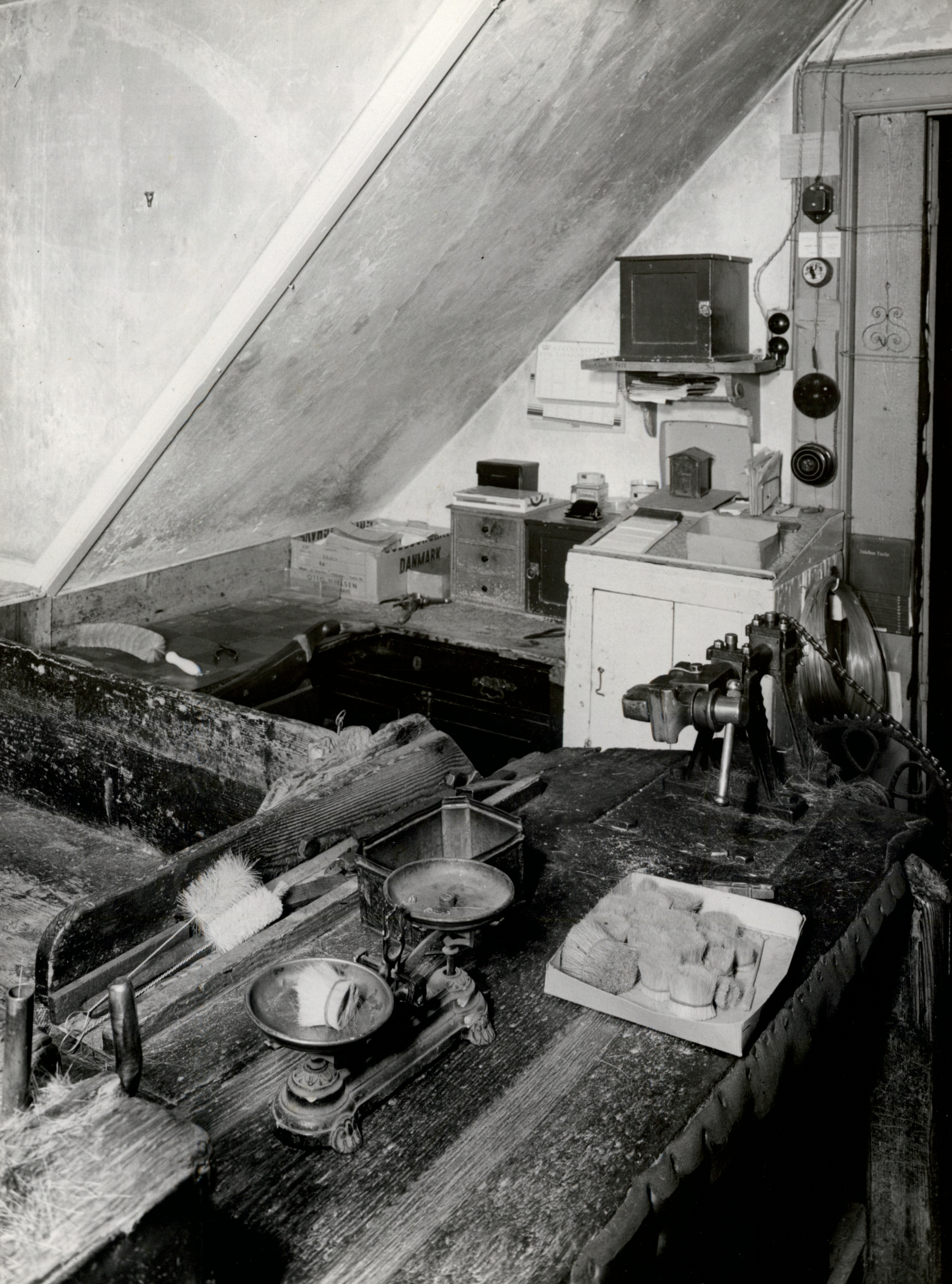 Bruuns børstenbinderværksted, Nørretofte Alle 28, Valby.